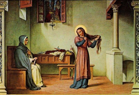 Young Saint Catherine of Siena cutting her hair // Catalina cortandose el cabello ante su madre. Alessandro Franchi, Caterina si taglia i capelli per dimostrare ai familiari la sua volontà di donarsi al Signore, (1893-1896), Siena, Santuario-Casa di S. Caterina da Siena, Oratorio della Camera